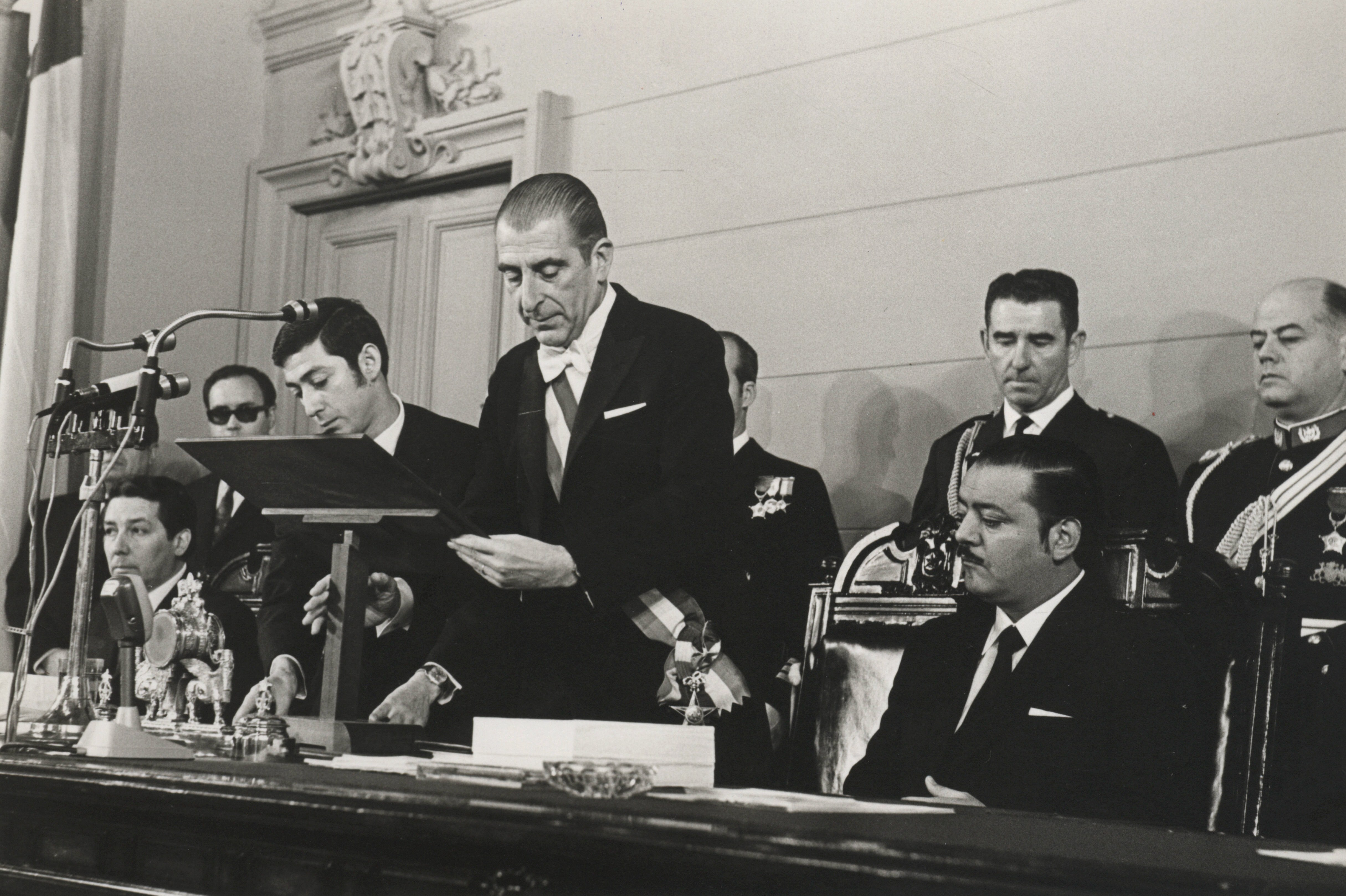 Sexto mensaje presidencial de Eduardo Frei. 1970 Congreso Pleno.